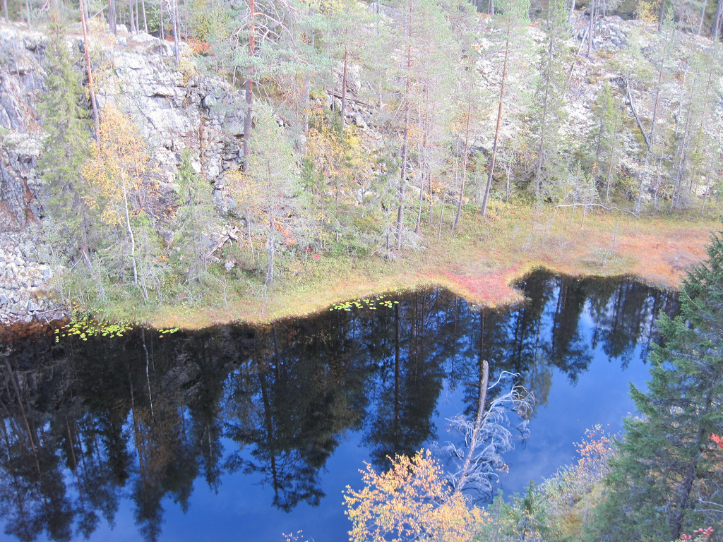 Hiidenportin kansallispuisto tarjoaa erinomaiset puitteet retkeilyyn.